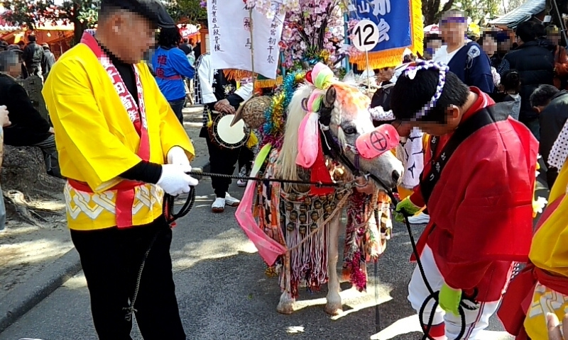 鹿児島県霧島市にある鹿児島神宮で行われる初午祭（はつうまさい）の画像。